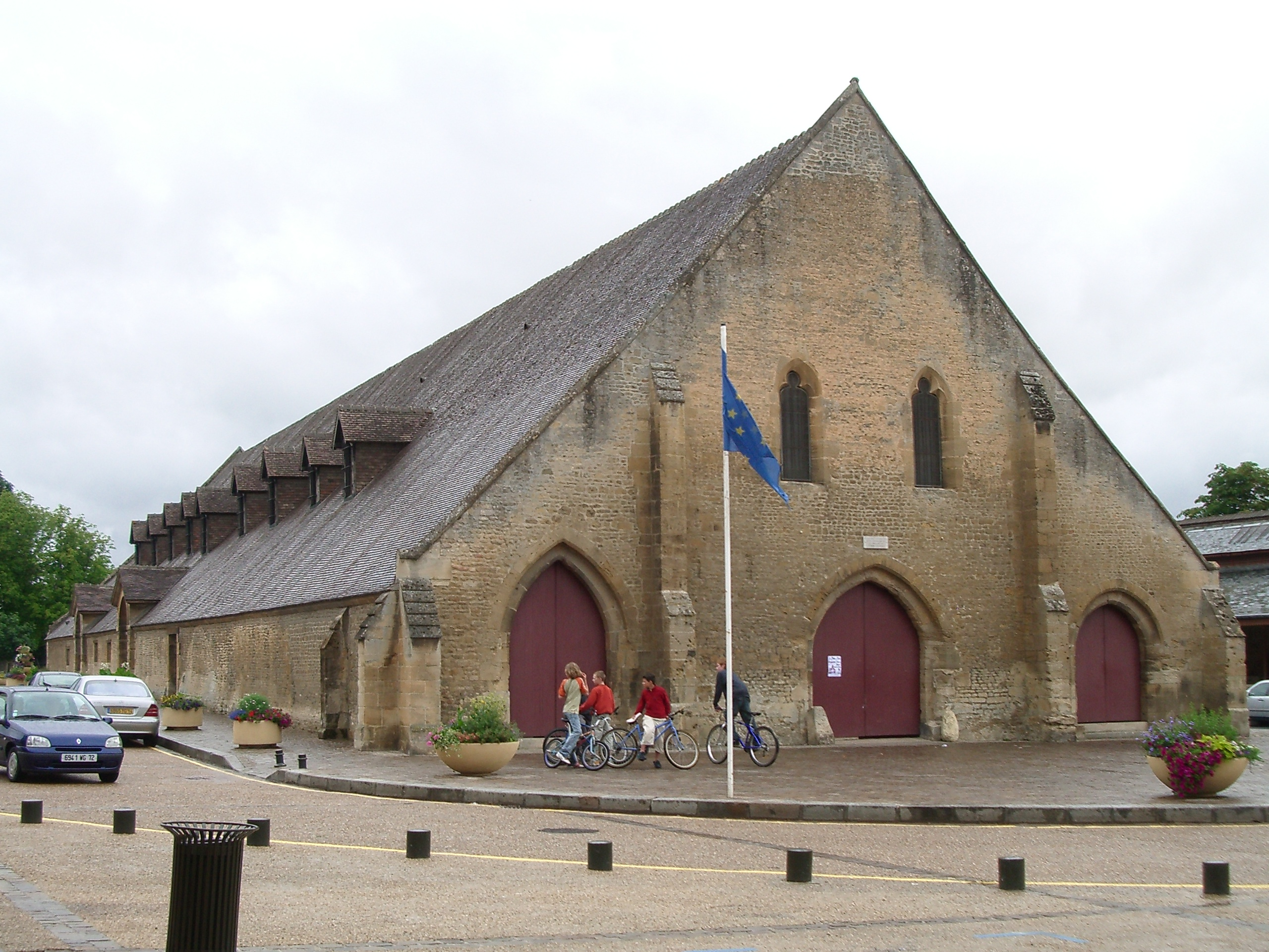 Halles_XIe